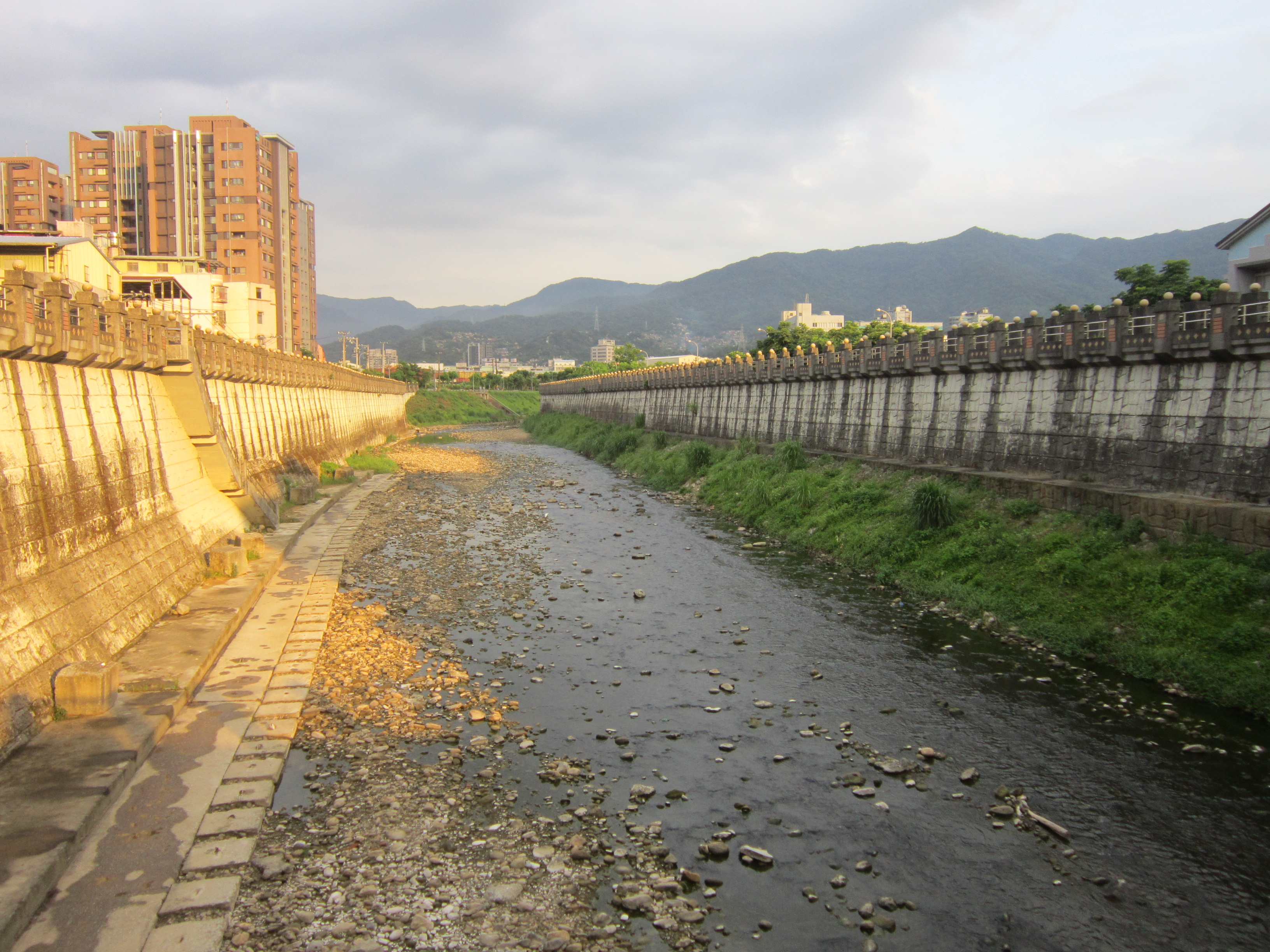 保長坑溪及兩側堤防。